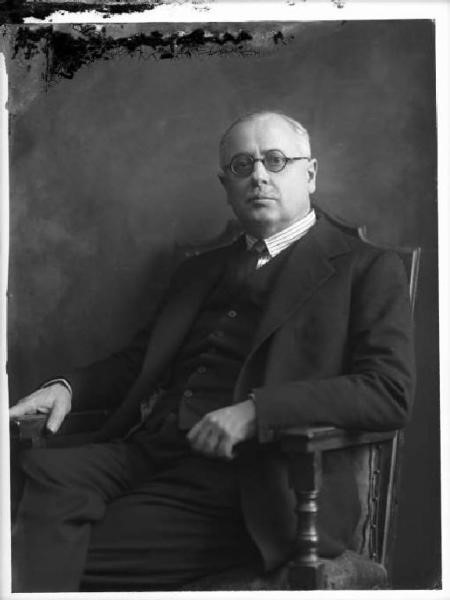 Ingegnere e politico italiano